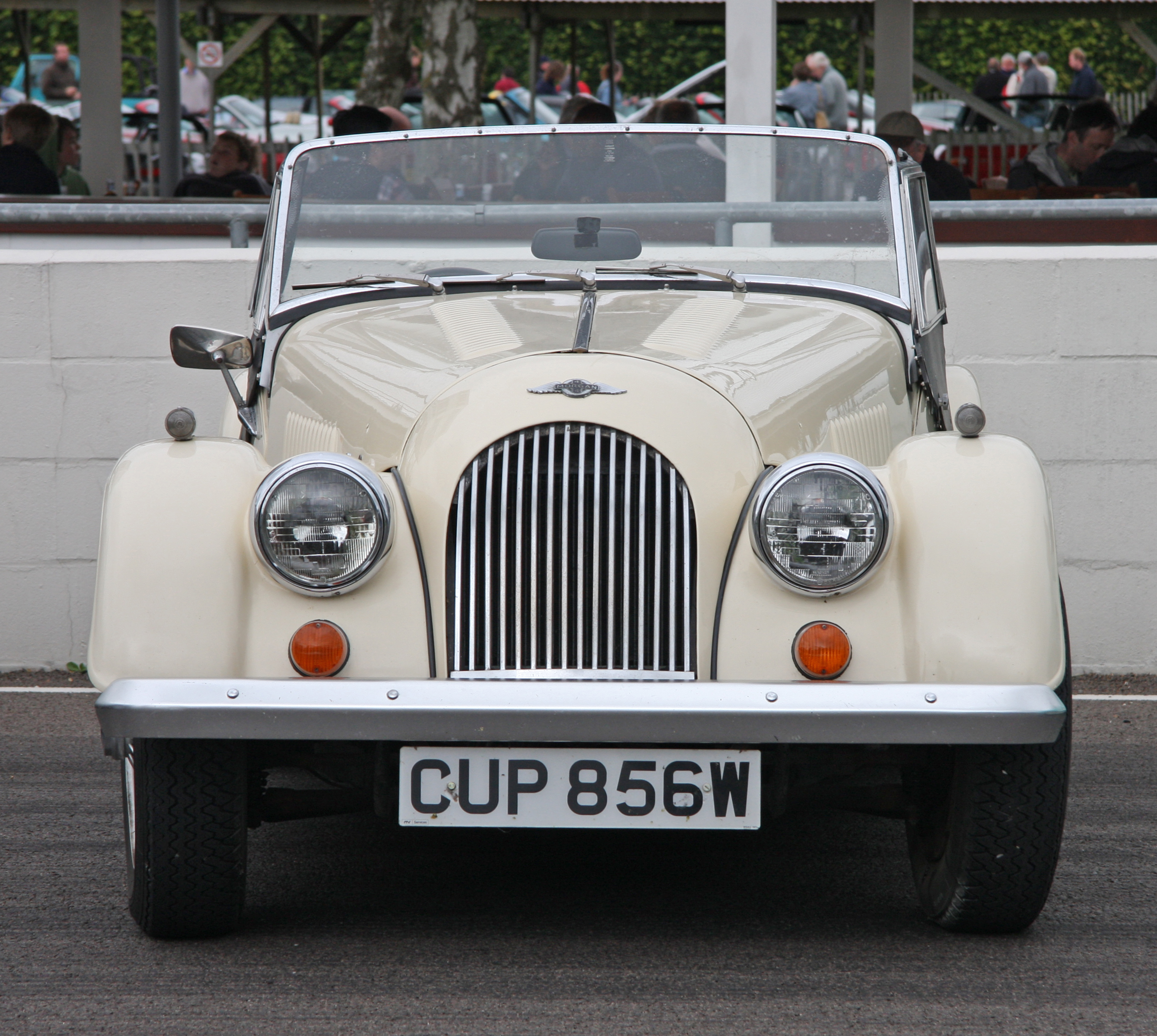 1981 Morgan +4